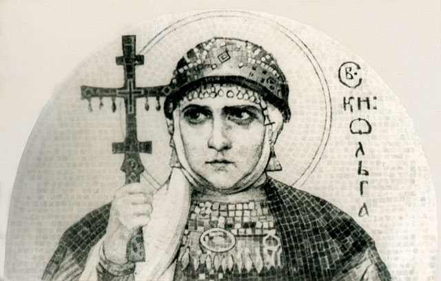 St. Olga of Kiev. Drawing for mosaic. «Святая Ольга». Н.К. Рерих. Эскиз мозаики.